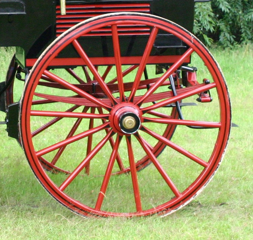 Kutscherad.